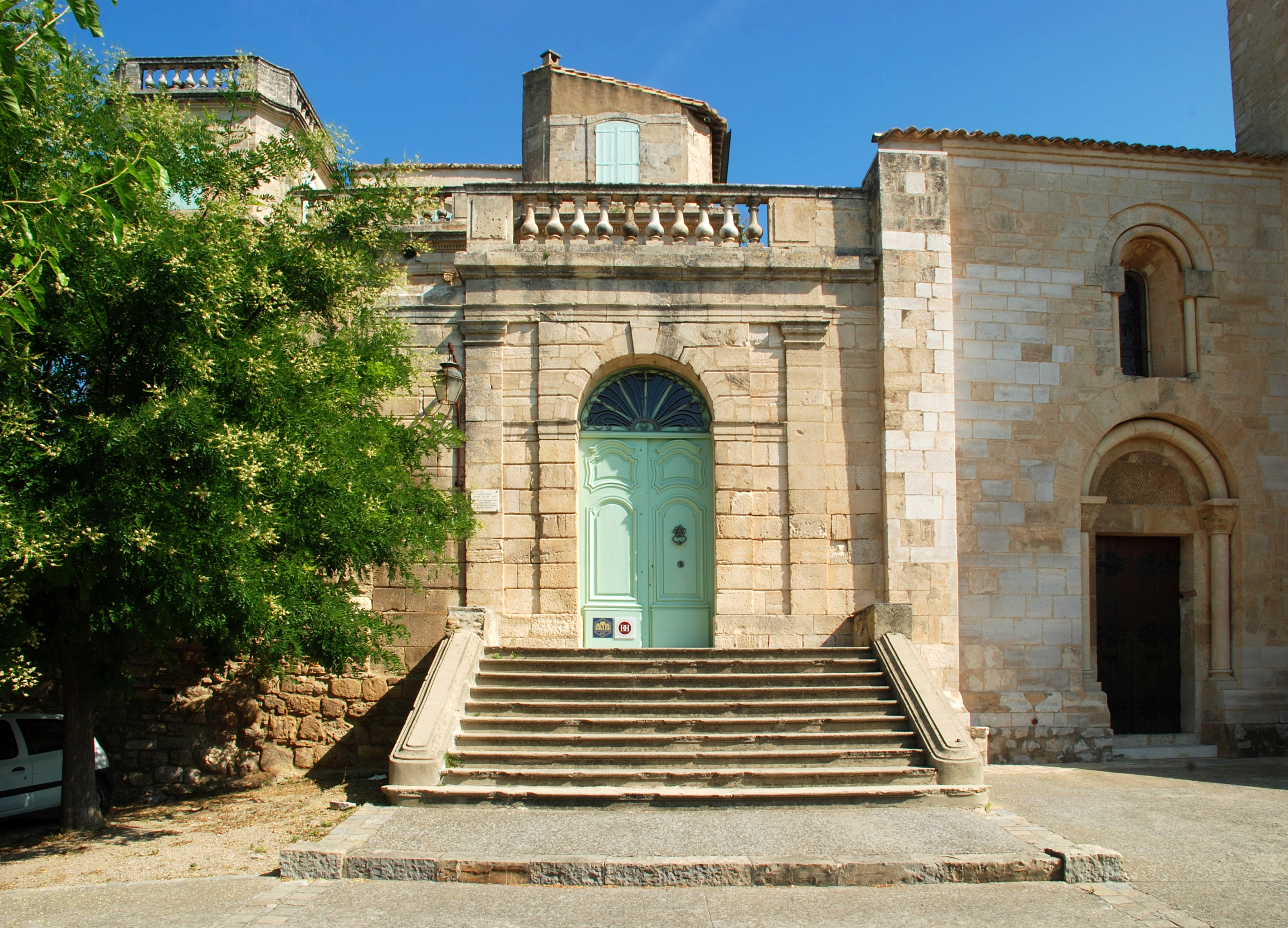 France - Languedoc - Hérault - Château d'Assas